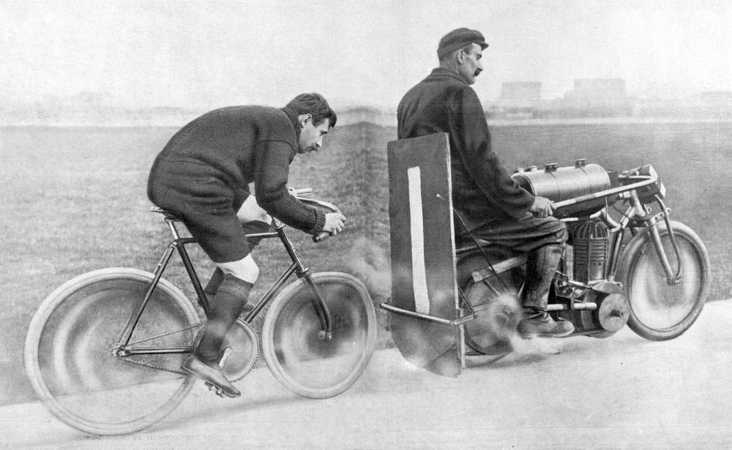 8 avril 1905, Paul Guignard effectue 89,904 kilomètres en une heure, derrière une moto.